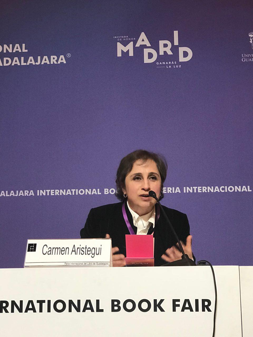 Carmen Aristegui durante un panel en la Feria Internacional del Libro de Guadalajara en 2017.